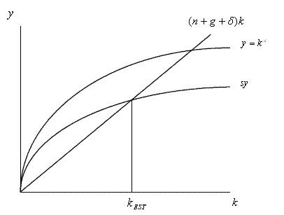 El diagrama de solow. Refleja, en los puntos de intersección de la curva k(n+g+d) con sy, el punto del capital del estado estacionario. Esto señala el Nivel optimo requerido.